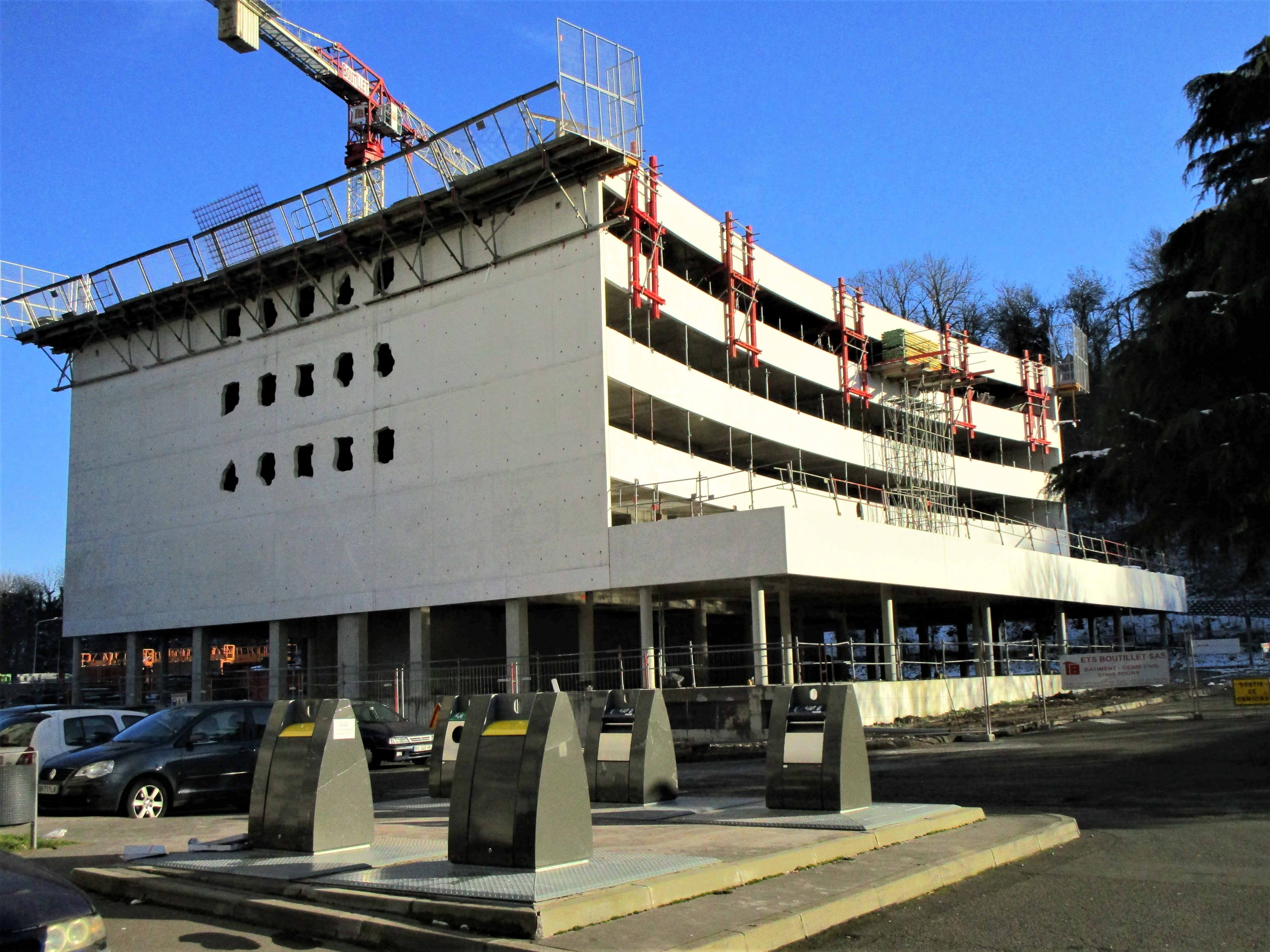 La résidence du bailleur social Val Touraine Habitat en cours du construction, sur la place Goya, dans le quartier des Fontaines de Tours, en février 2018.